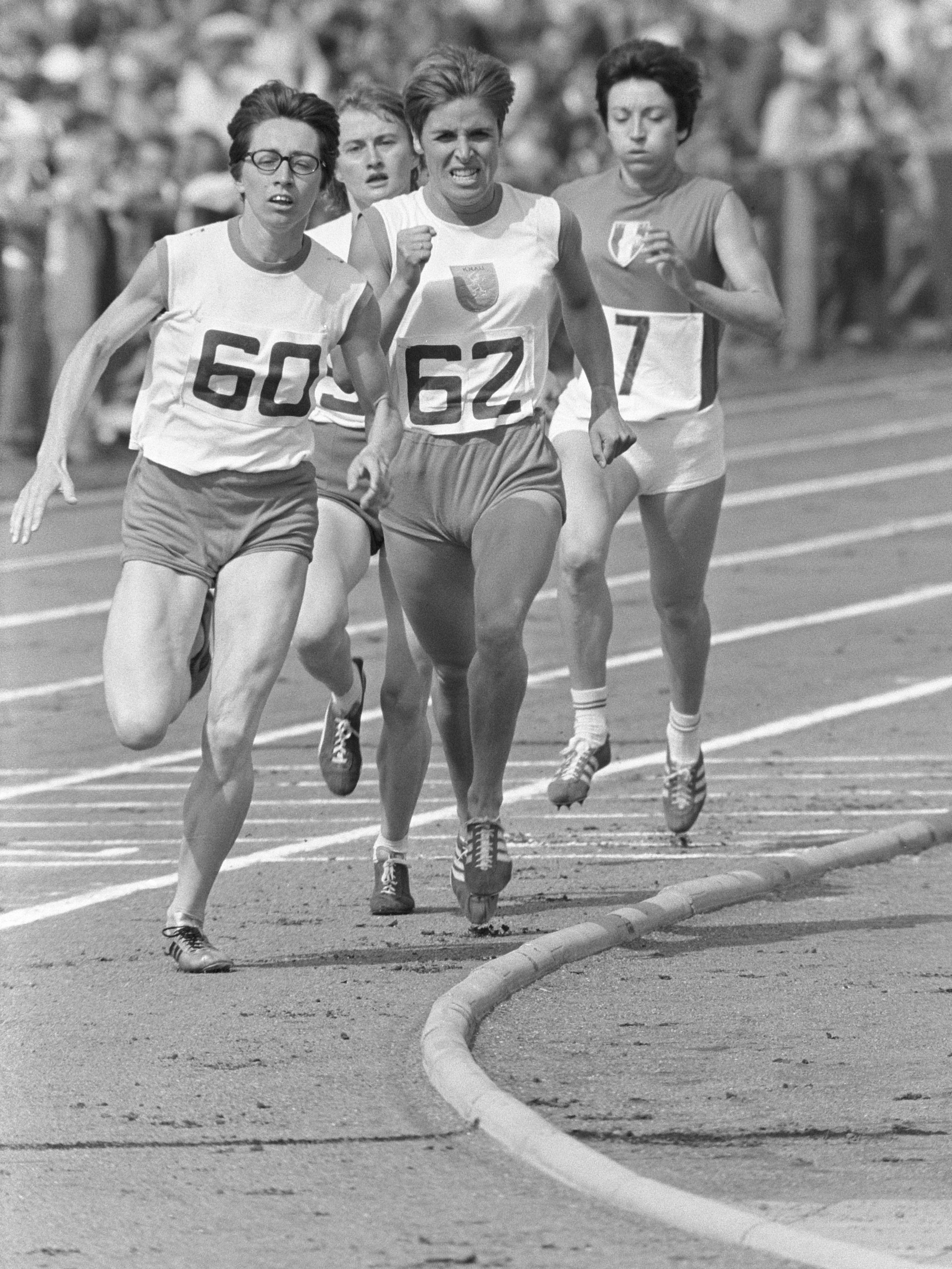 Dames atletiek-interland Frankrijk-Nederland-Zweden in Uden: Op de 800 m Mia Gommers (nr. 60) en Ilja Keizer (nr. 62) 13 juli 1969